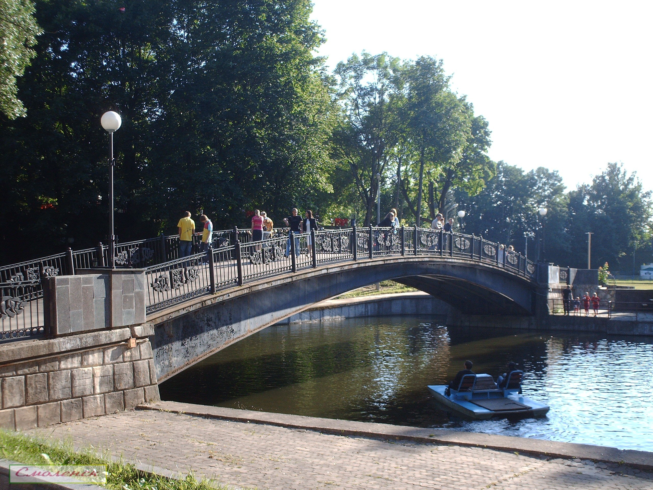 Мостик через пруд в опатинском саду